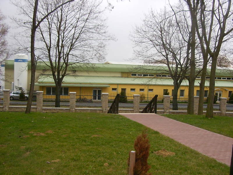 A „Balfi víz” palackozó üzeme (Balf, Sopron)